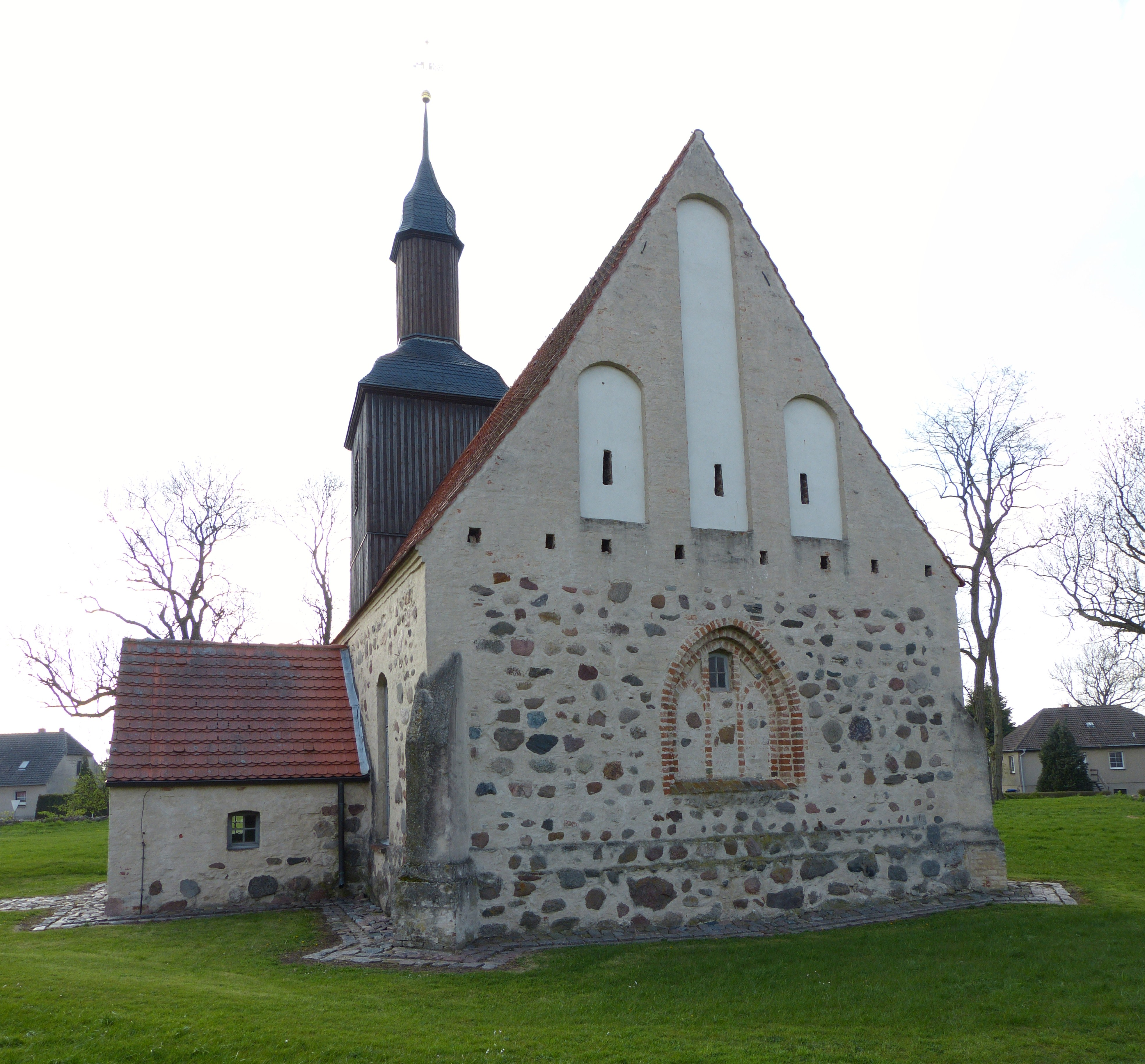 Kirche in Kölln, Gemeinde Werder bei Altentreptow, Ostgiebel